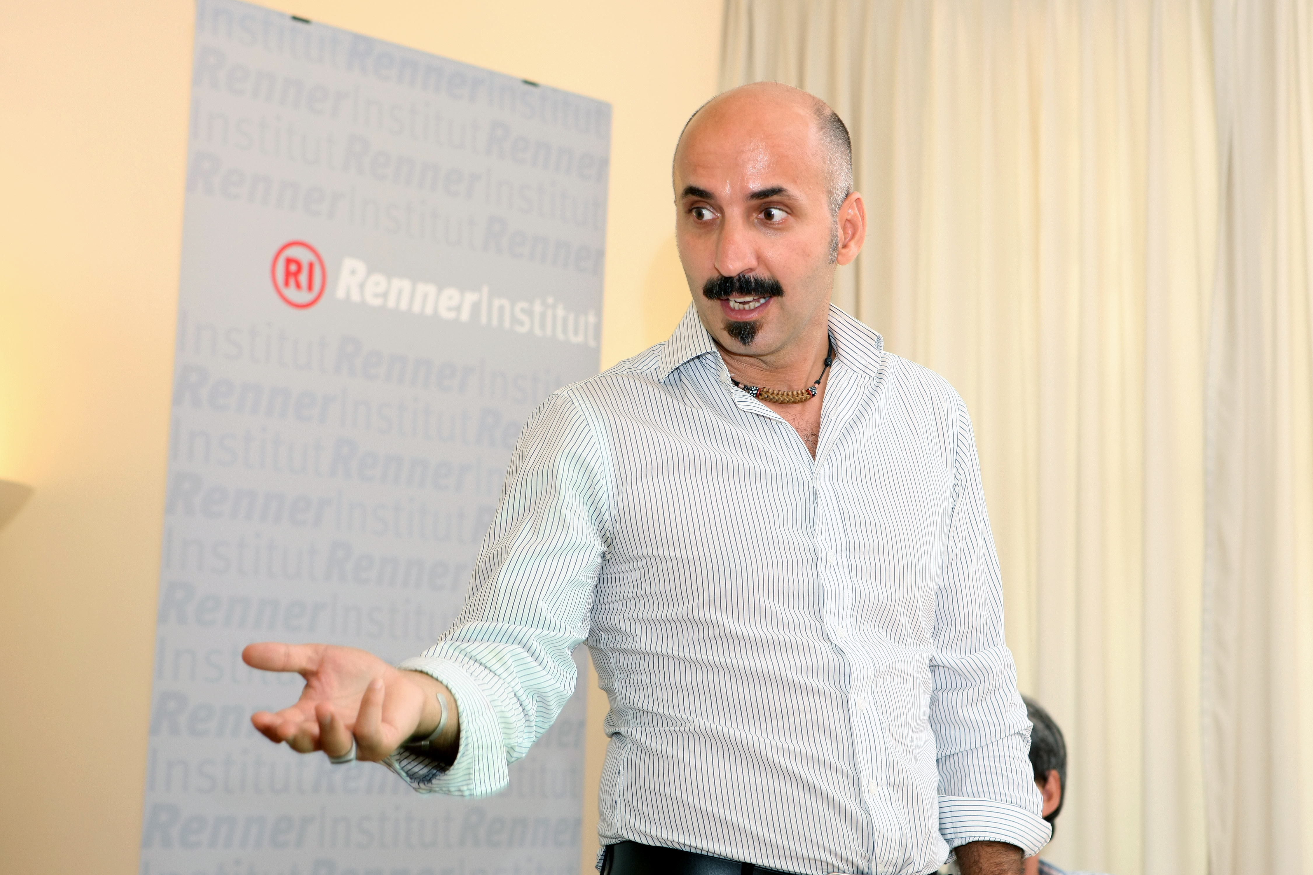 Integrationsexperte Kenan Güngör; Foto: Gisela Ortner